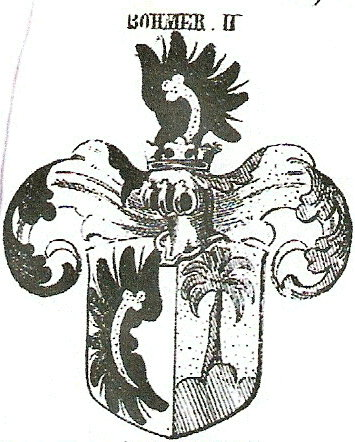 Wappen von Karl August von Boehmer